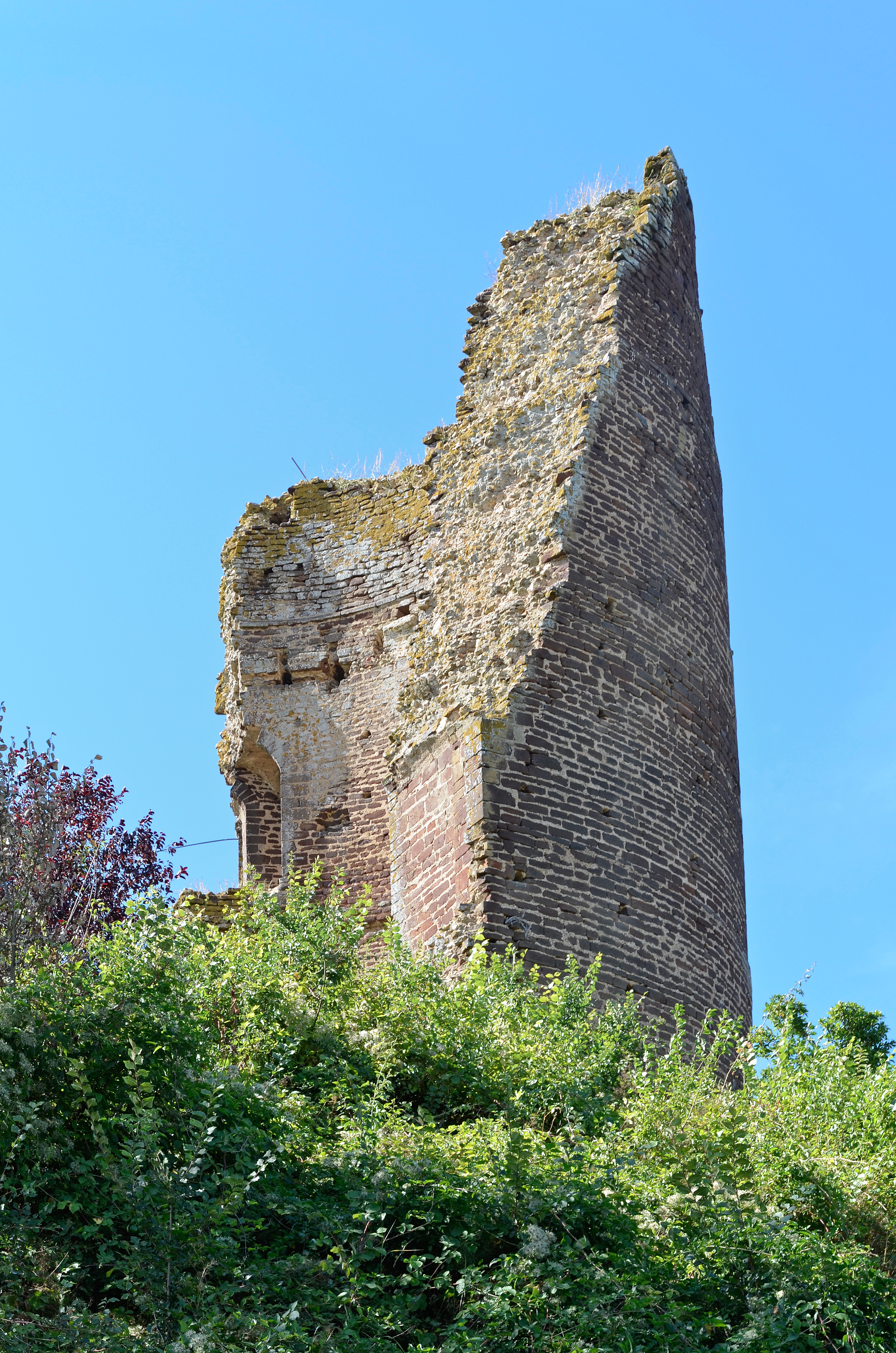 Château de Mondoubleau - Loir-et-Cher .